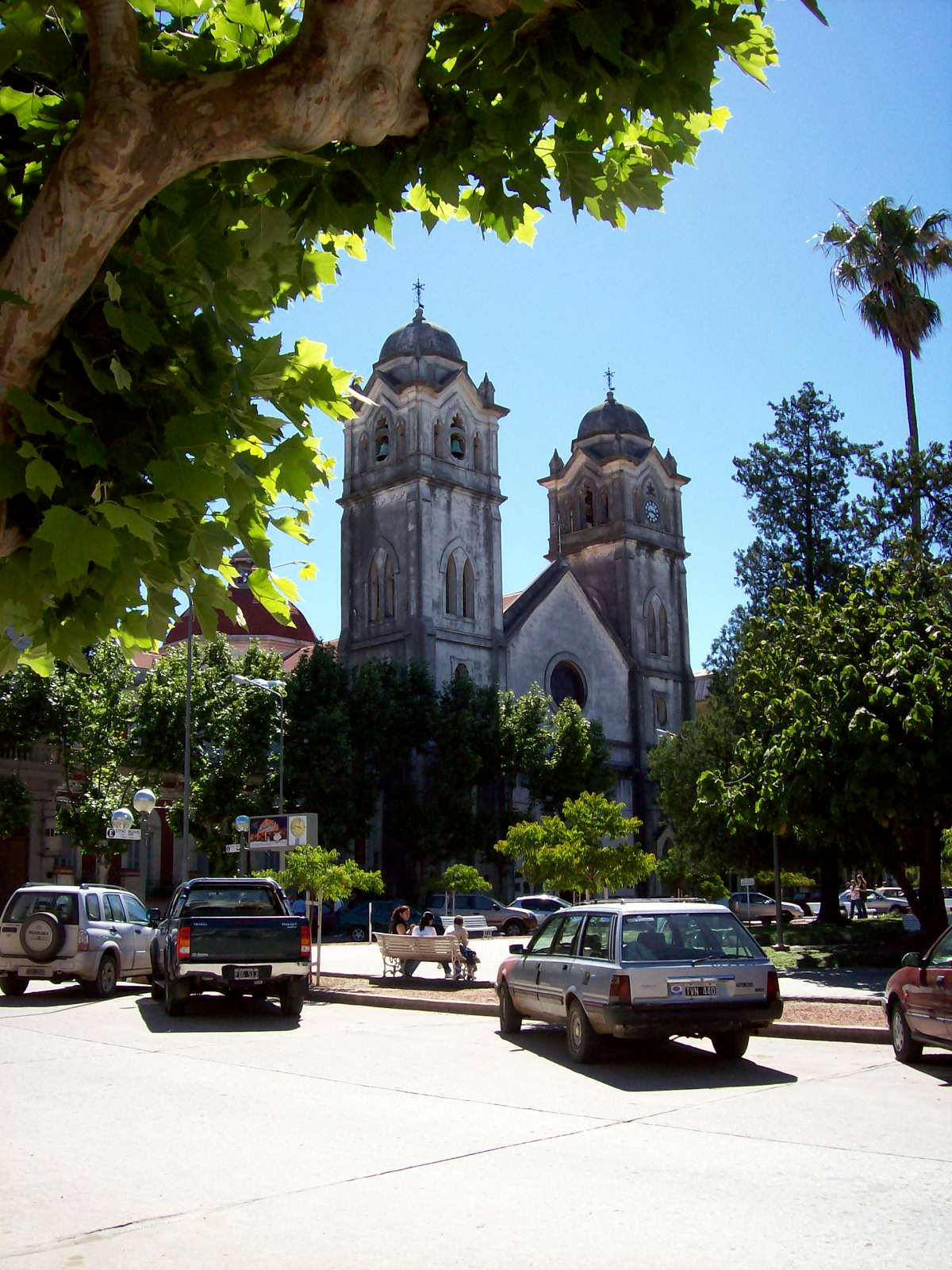 Templo Parroquial de la Virgen de Aranzazú and main park at Victoria, Entre Ríos, Argentina.